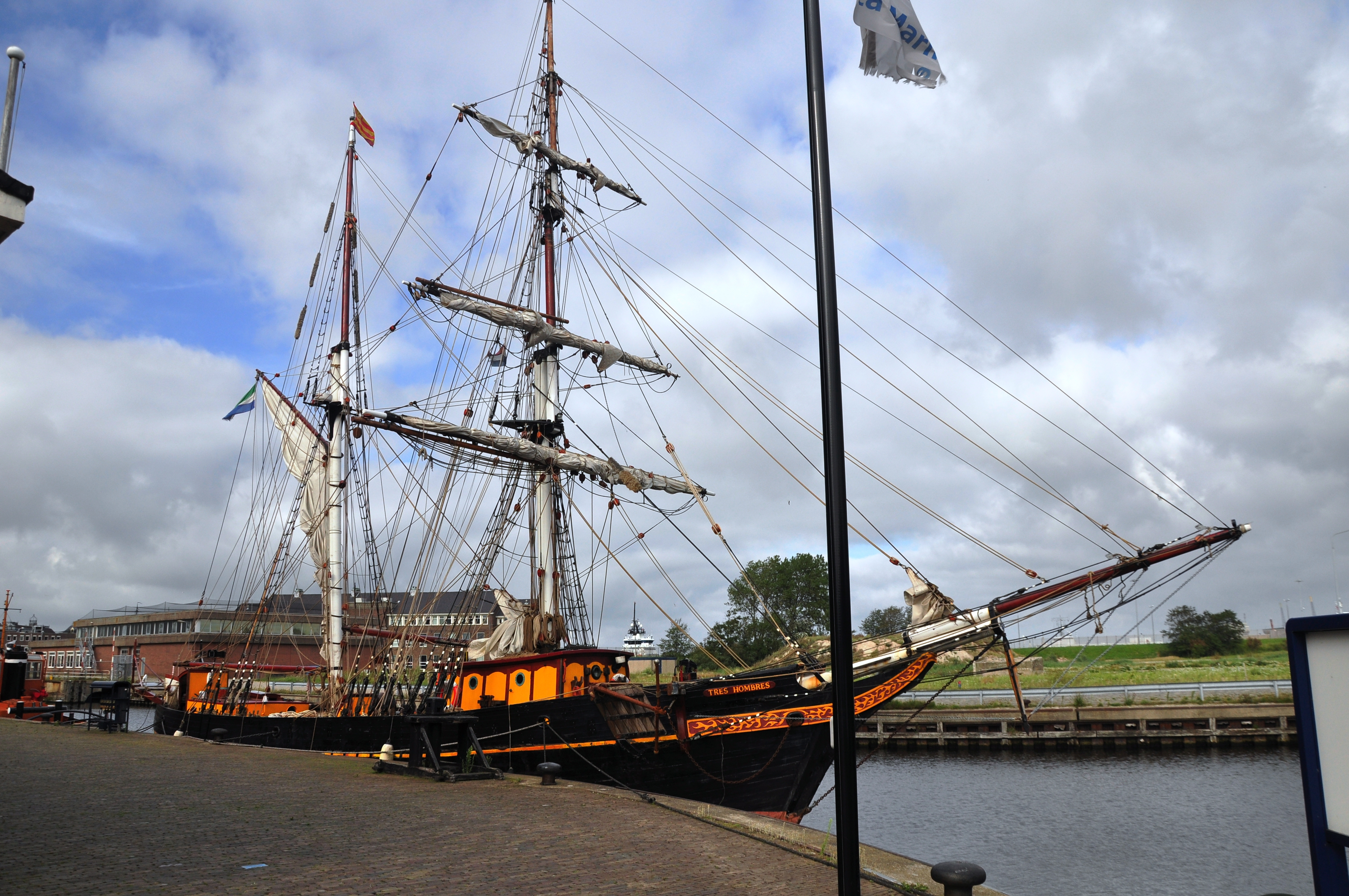 Holland, Den Helder, Museumshafen, Segelschiff Tres Hombres